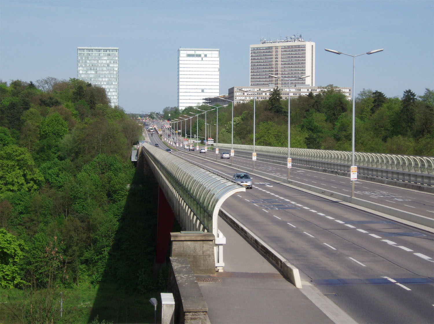 Rout Bréck, am Hannergrond d'Héichhaiser vum Kierchbierg